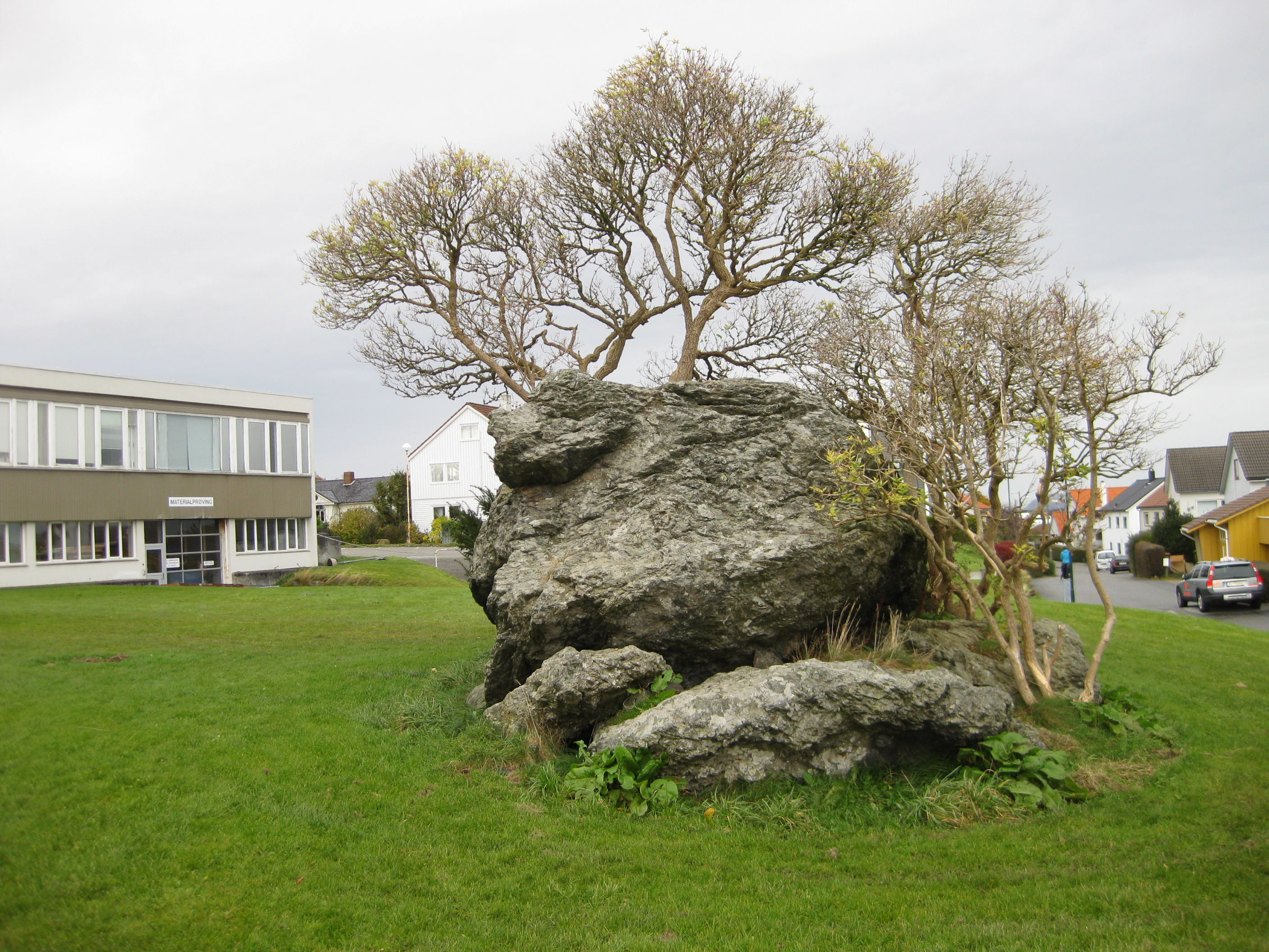 Erratic boulder at Rogalandsgaten, Stavanger